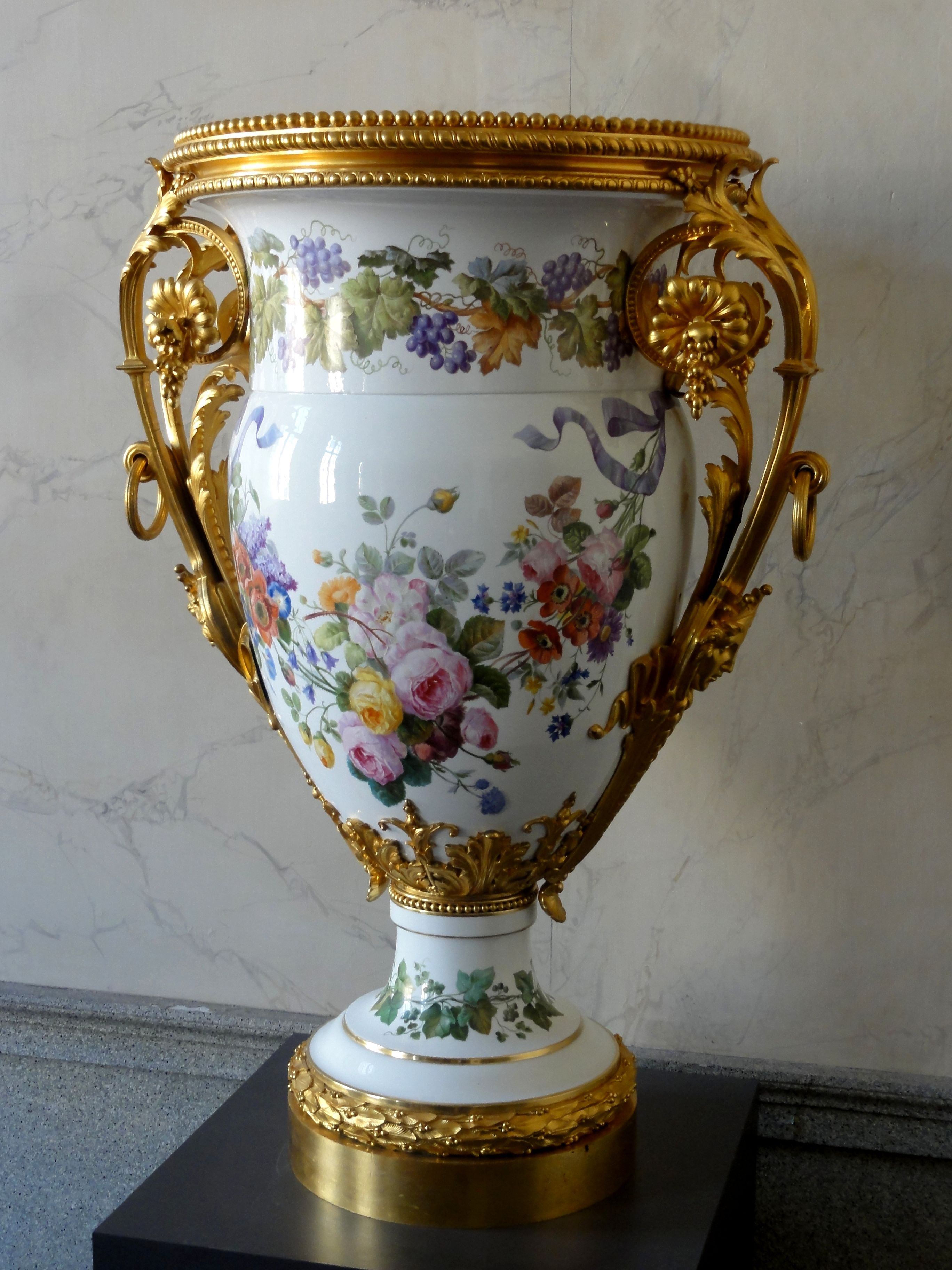 Grand vase en porcelaine de Sèvres dans l'antichambre de la salle à manger de l'Empereur.